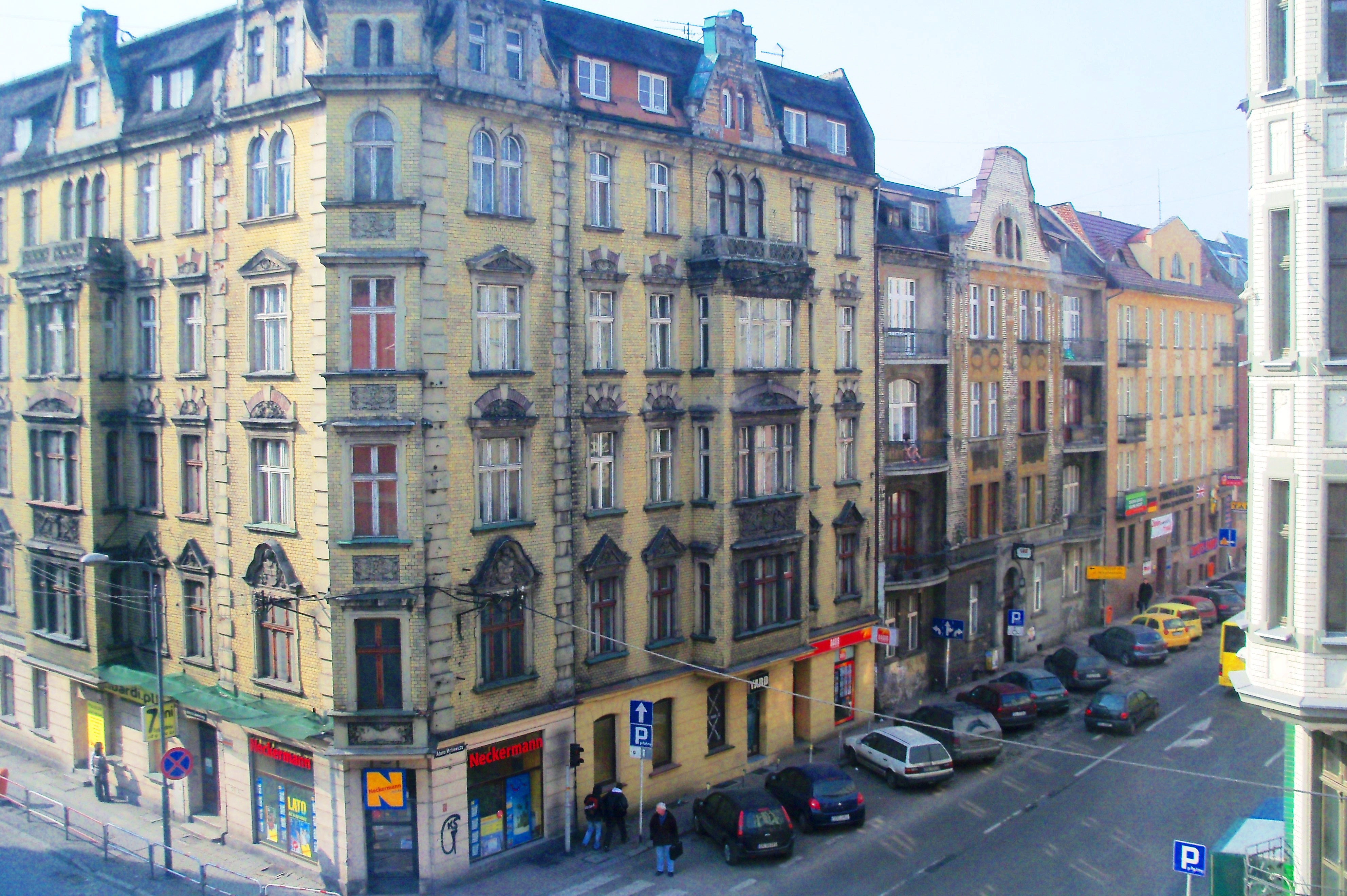 Katowice - skrzyżowanie ulic Słowackiego i Mickiewicza (po lewej stronie budynek przy ul. Słowackiego 15)